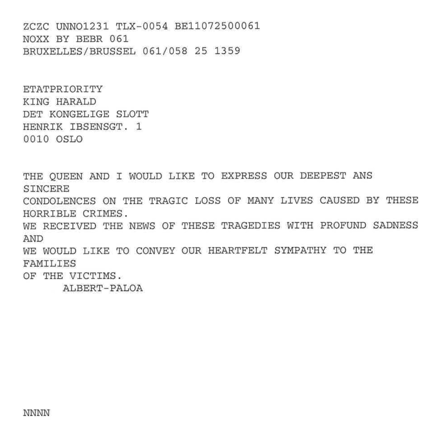 Telegram-fra-kong-albert-til-kong-harald-juli-2011